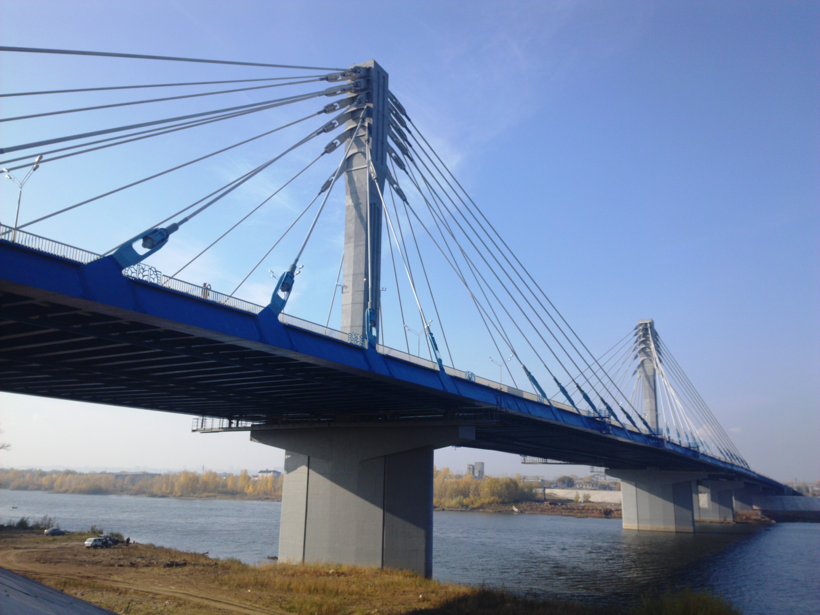 Кировский автомобильный мост пересекает р. Самара.